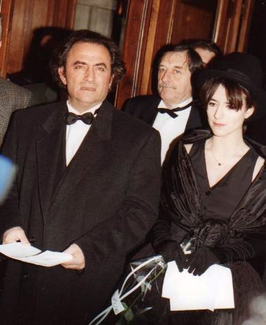 Richard Bohringer et Romane Bohringer à la cérémonie des Césars